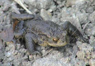 Bufo bufo in Gebersbach-Knobelsdorf (Germany)